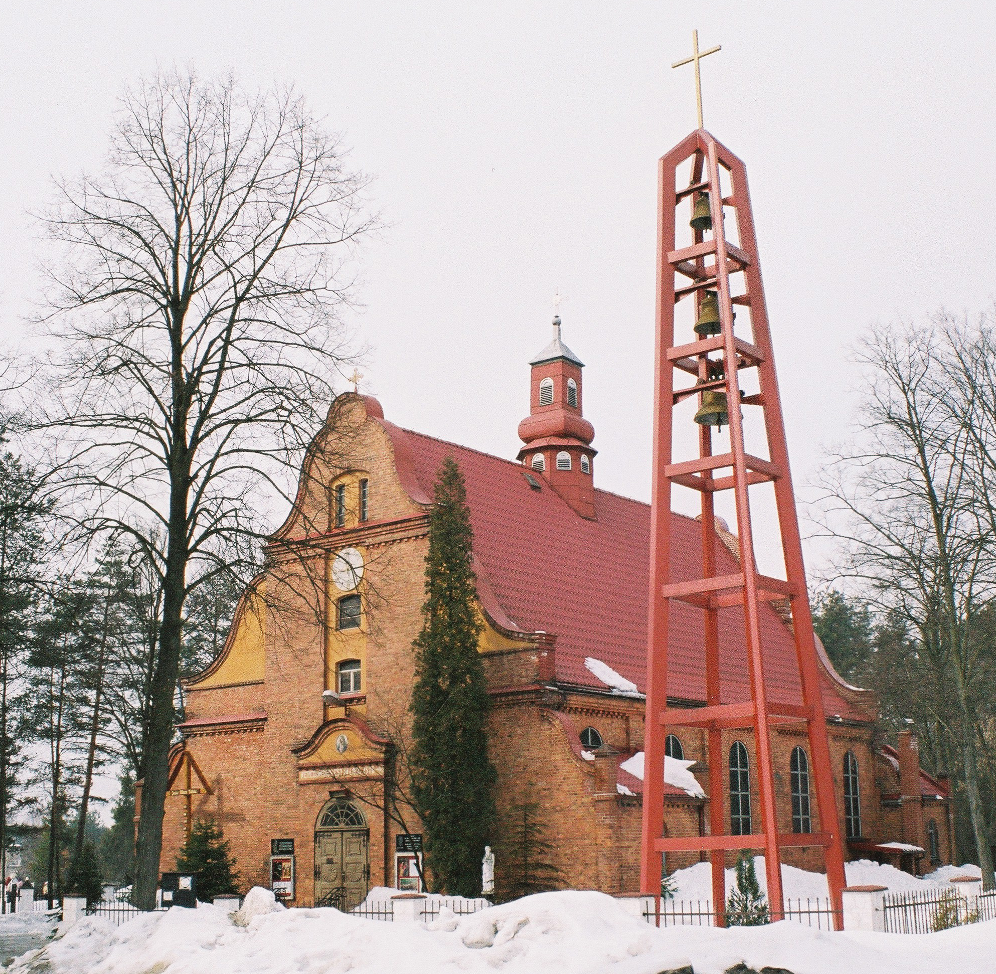 Church in Kalety-Miotek, powiat lubliniecki, Poland Author: Przykuta Date:2006-03-24